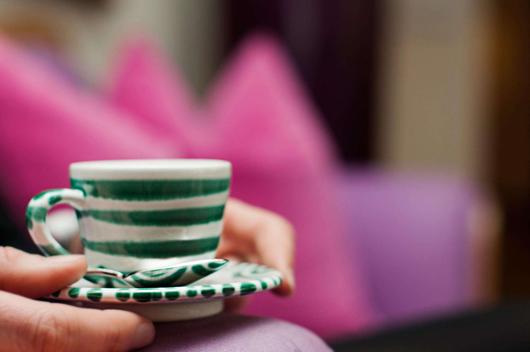 Gmundner Keramik Espresso Tasse im Design Grüngeflammt